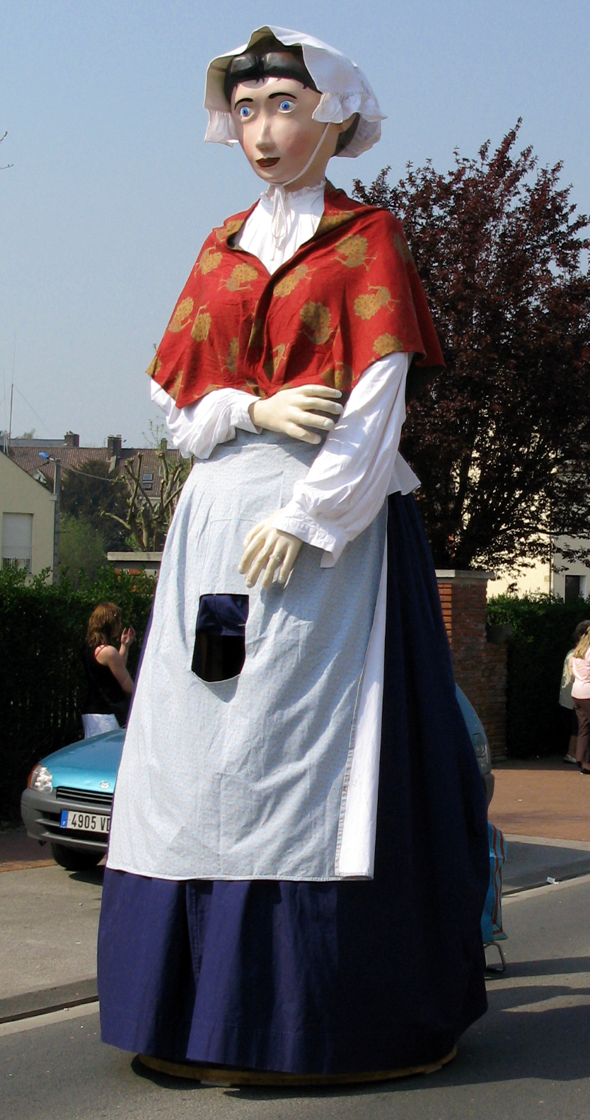 Airaines (Somme, France) - Animation festive au centre-ville, un dimanche de printemps. Le géant Armandine. .